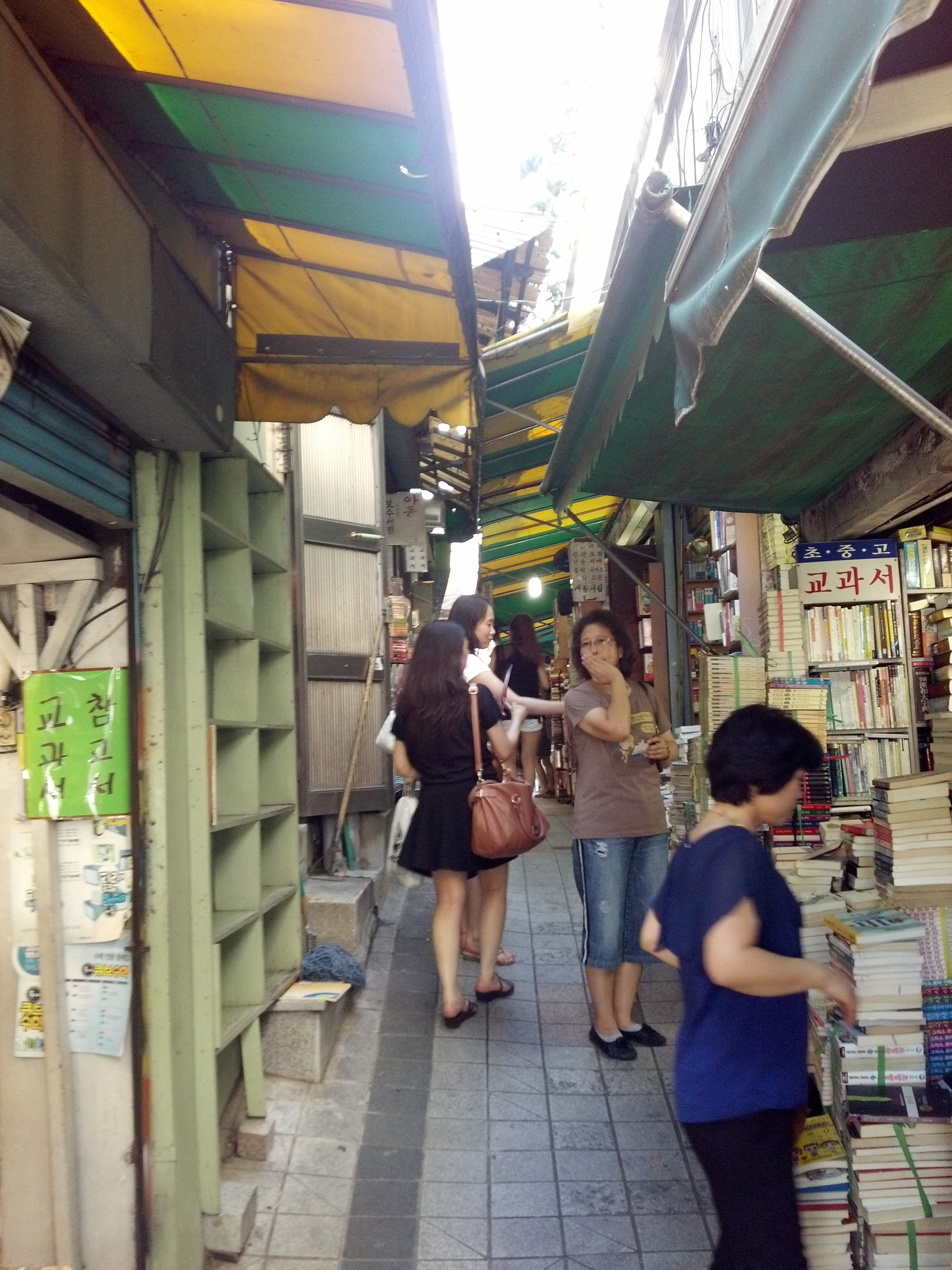 This picture was taken at August 2012 in Busan.